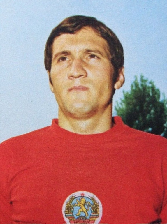 Figurina Calciatori Panini Munchen74